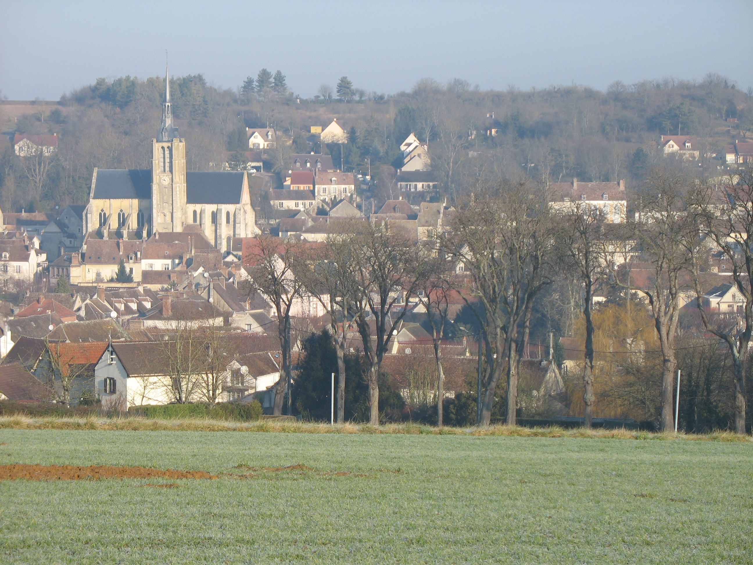 Vue de Donnemarie-Dontilly (église de Donnemarie)